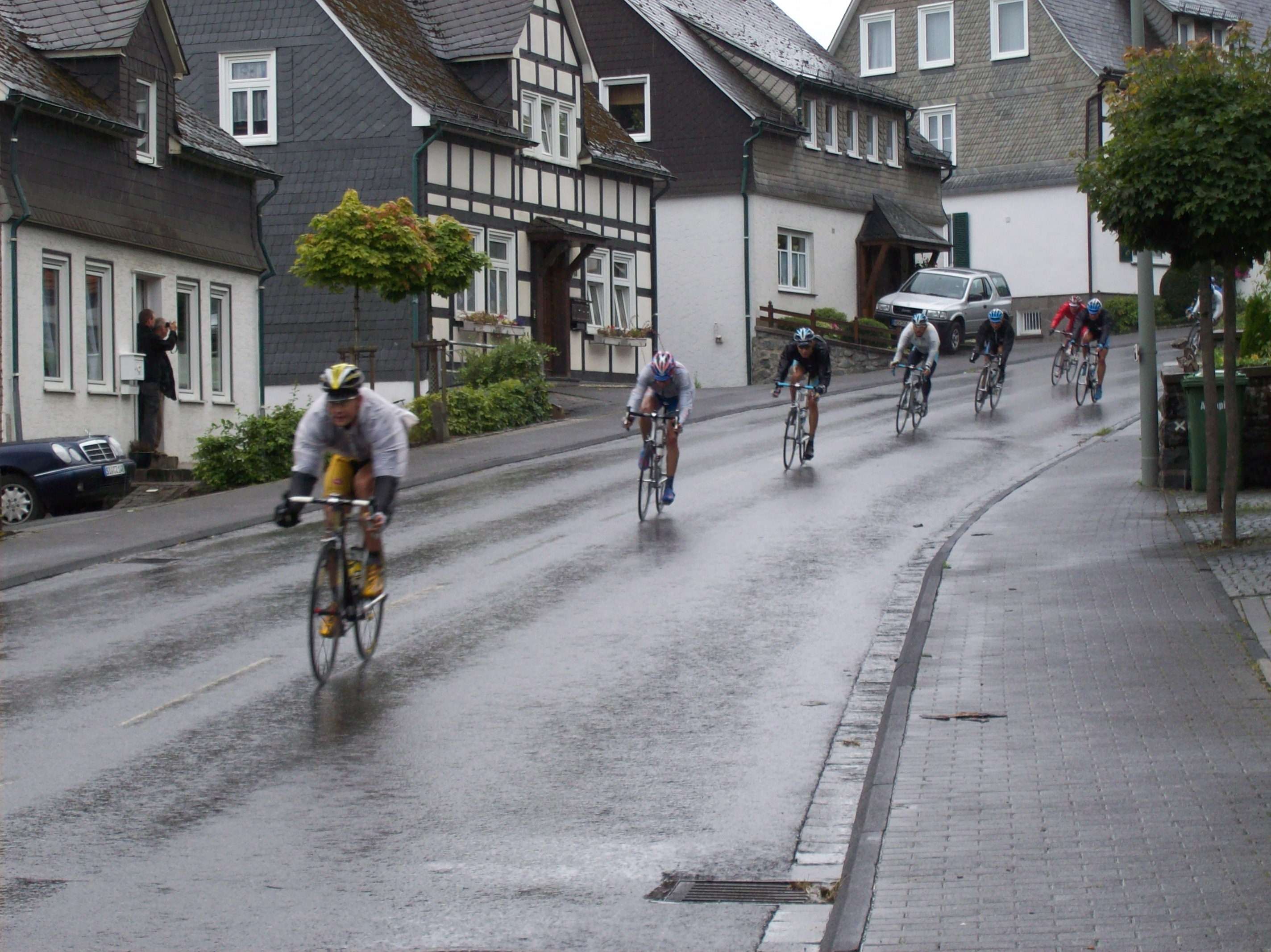 Deutschland Tour 2008 - 5. Etappe nach Winterberg, fotografiert in Schmallenberg